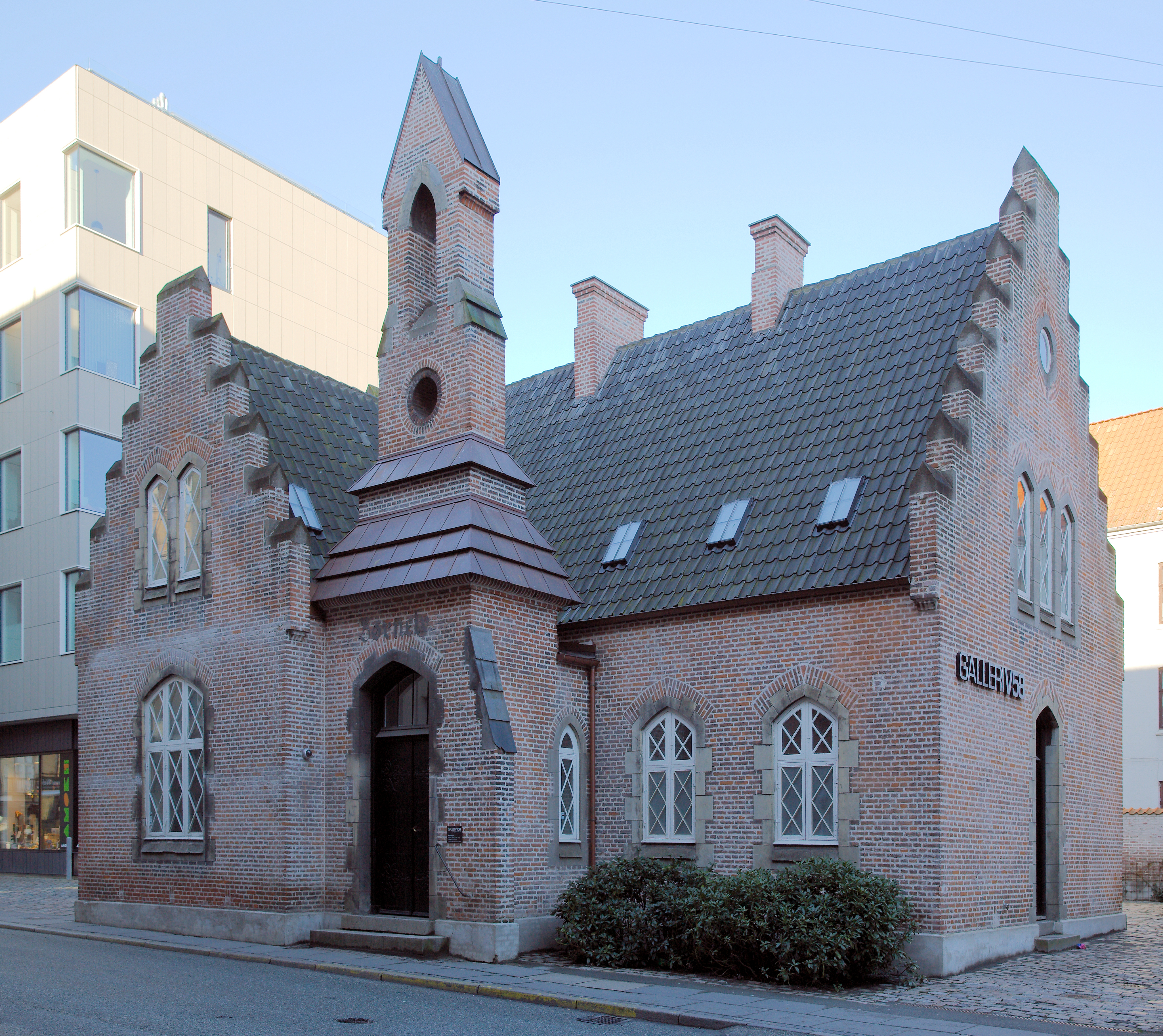 Mejlen, Aarhus